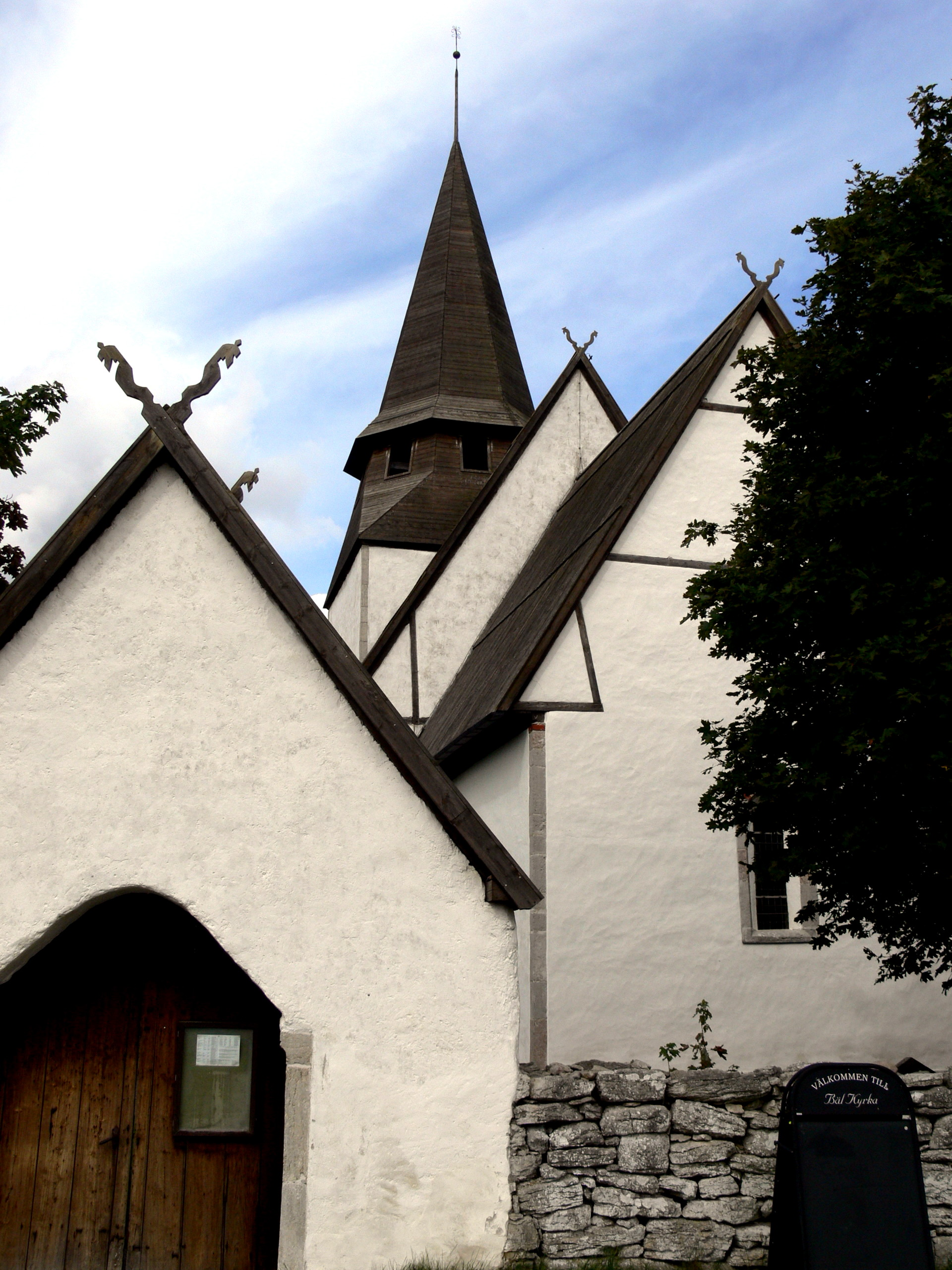 Bäl kyrka auf Gotland. Kirche mit Friedhofstor